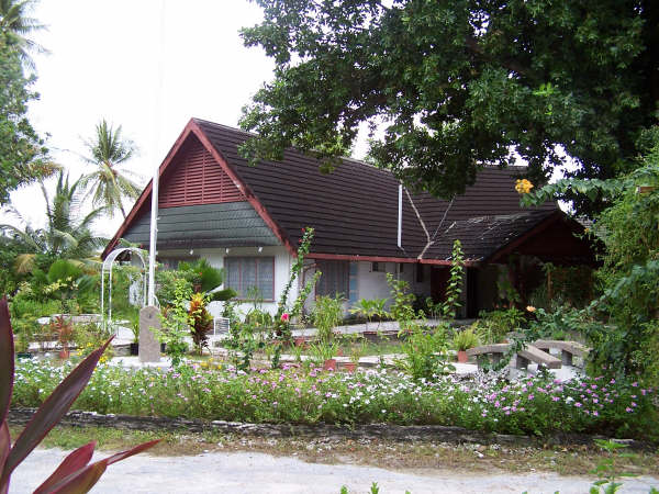 Presidential Residence, Kiribati